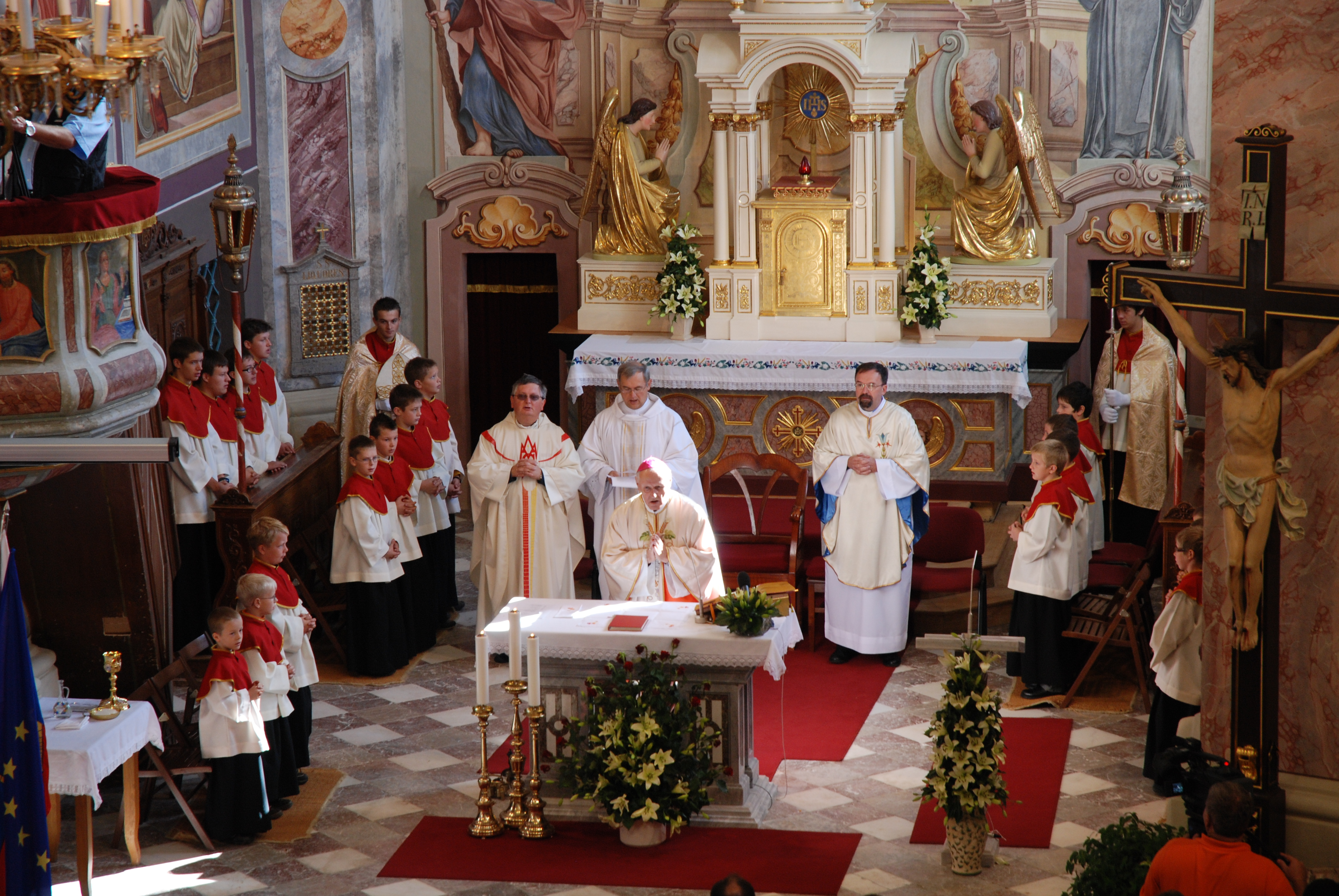 Mašo v Bohinju je vodil upokojeni beograjski nadškof Franc Perko